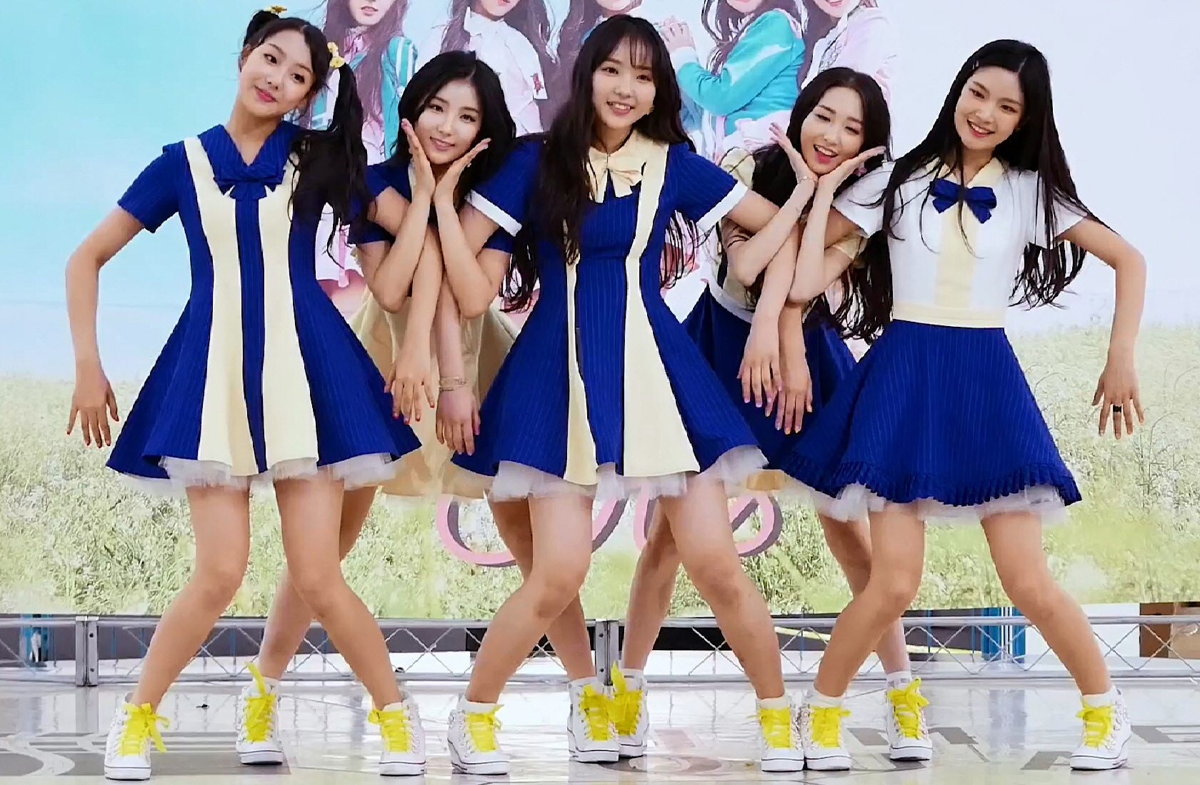 170630 엘리스 영동포 타임스퀘어 팬사인회 - 엘리스 '우리 처음' 4K 직캠 by DaftTaengk 3m22